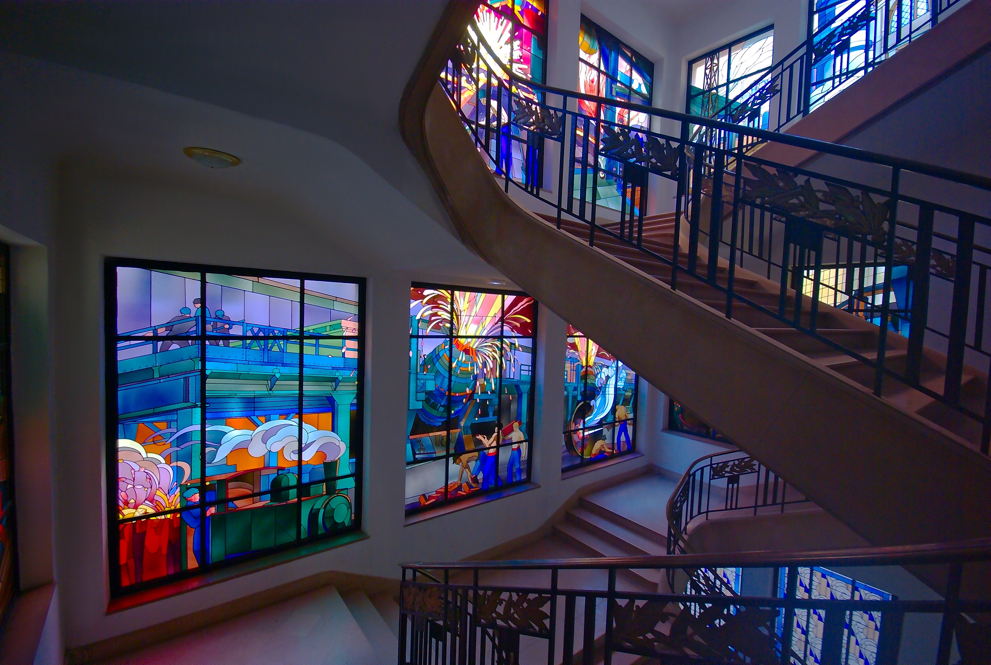 Situés à la maison de la Formation de Longlaville (anciennement Grands Bureaux des Aciéries de Longwy), ces vitraux exceptionnels de style Art Déco (1928) se répartissent sur 4 étages en 27 verrières qui retracent les métiers de la sidérurgie dans les années 20. Dessinés par Louis Majorelle, ils seront réalisés après sa mort.